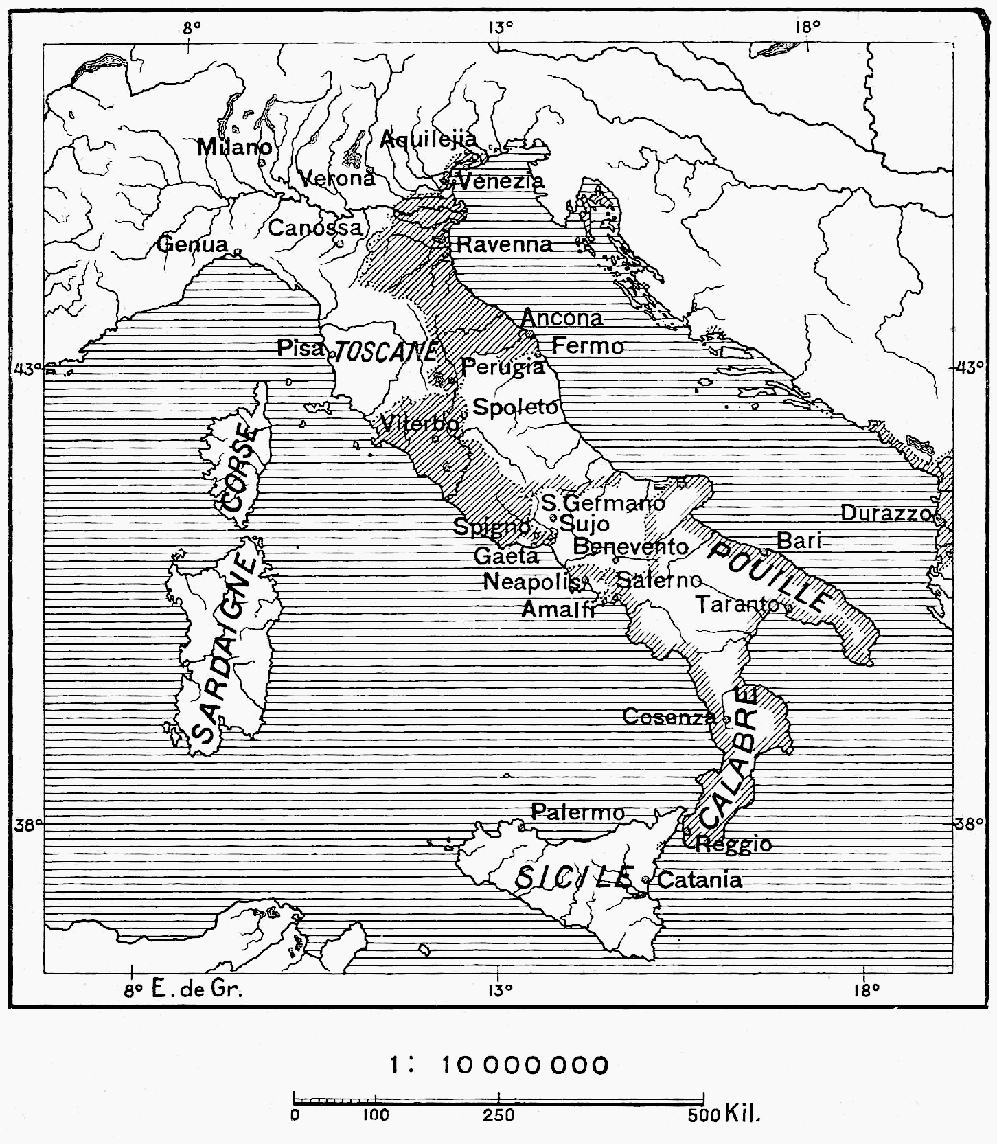 Possessions de Grégoire VII